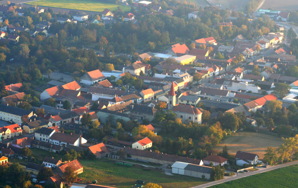 Helikopter Bild - Münchendorf Nordwest-Ansicht.